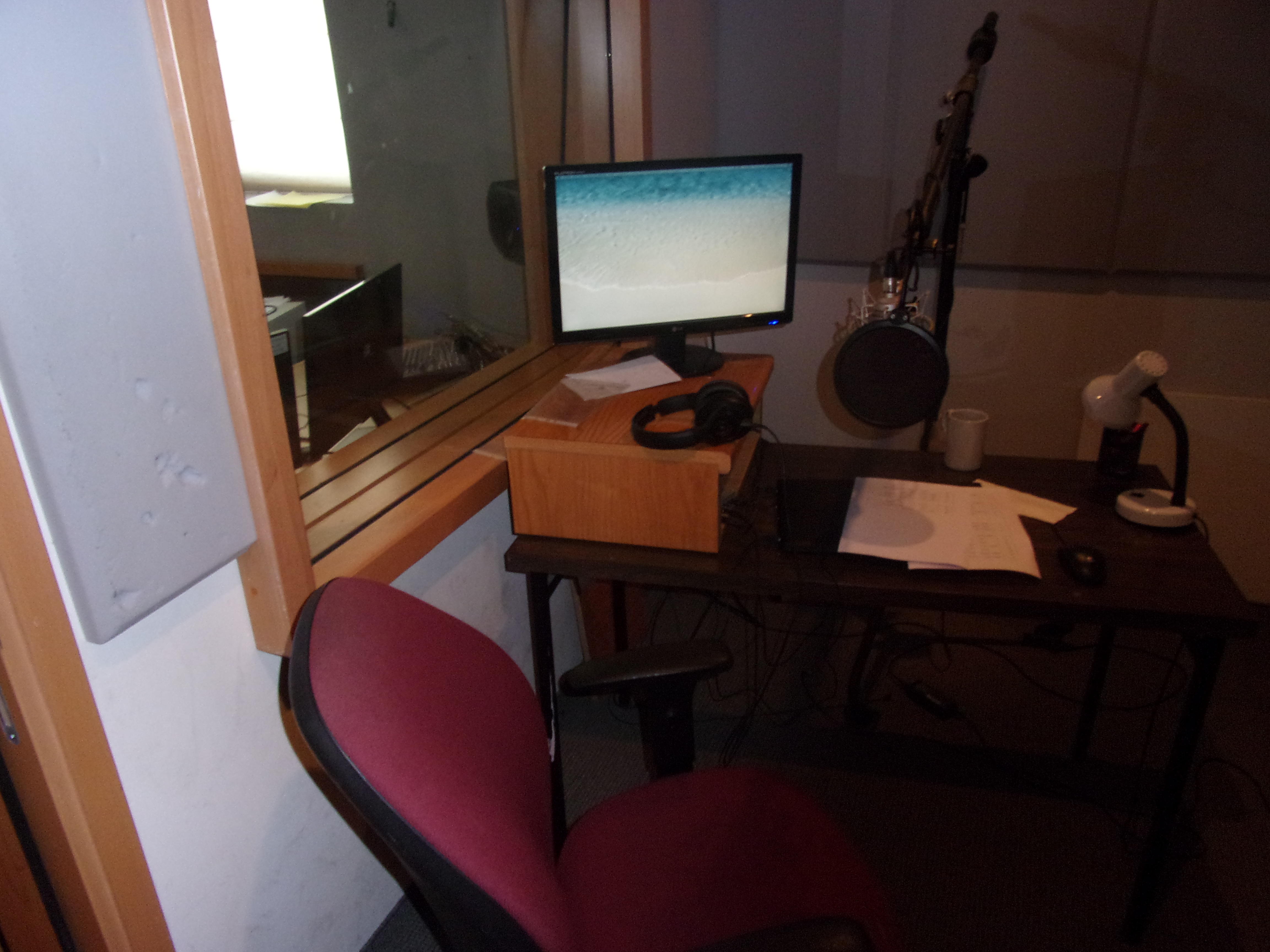 חדר הקלטות של המדבבים 2017